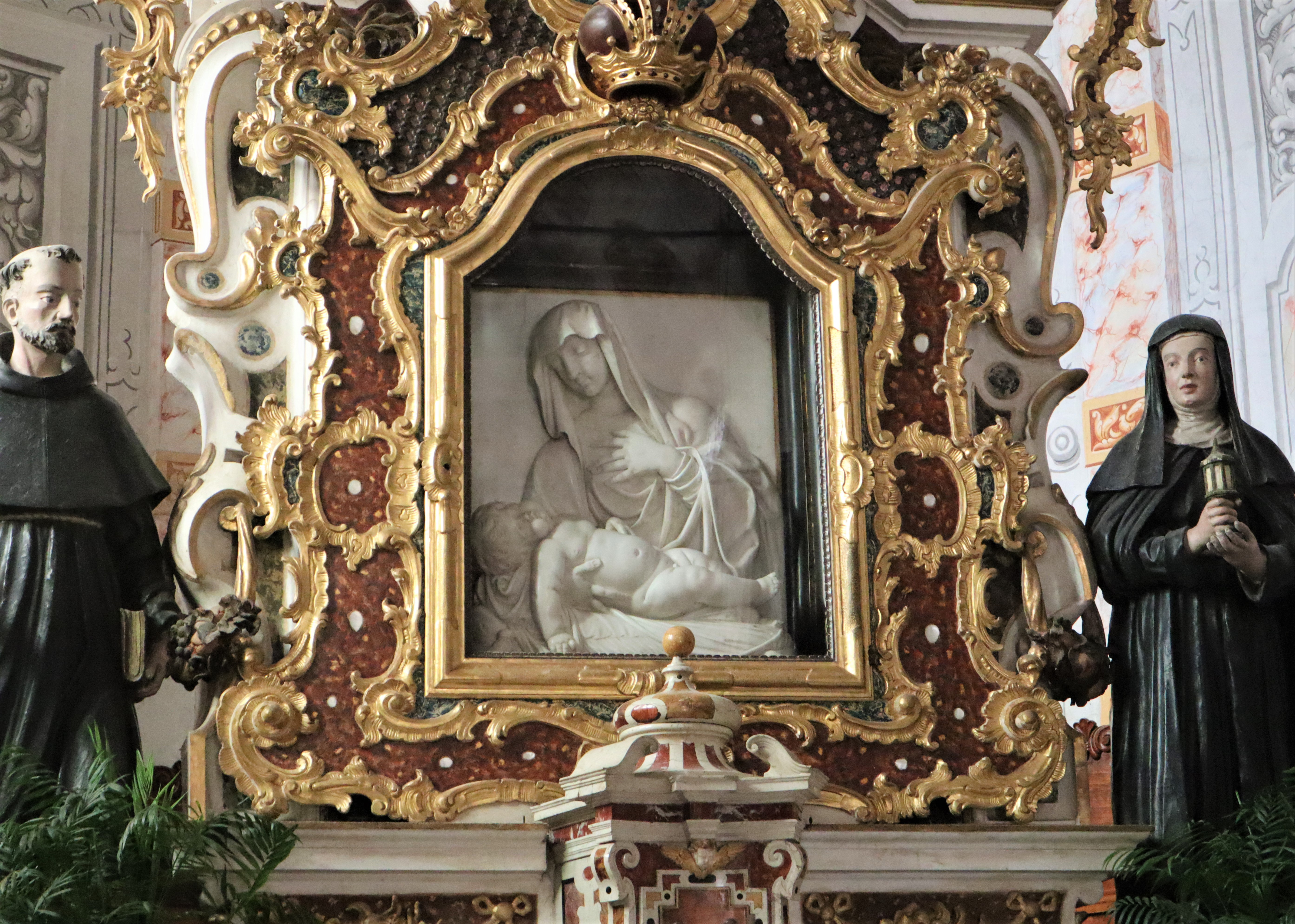 Chiesa della Beata Vergine Maria a Nogaredo. Interno.